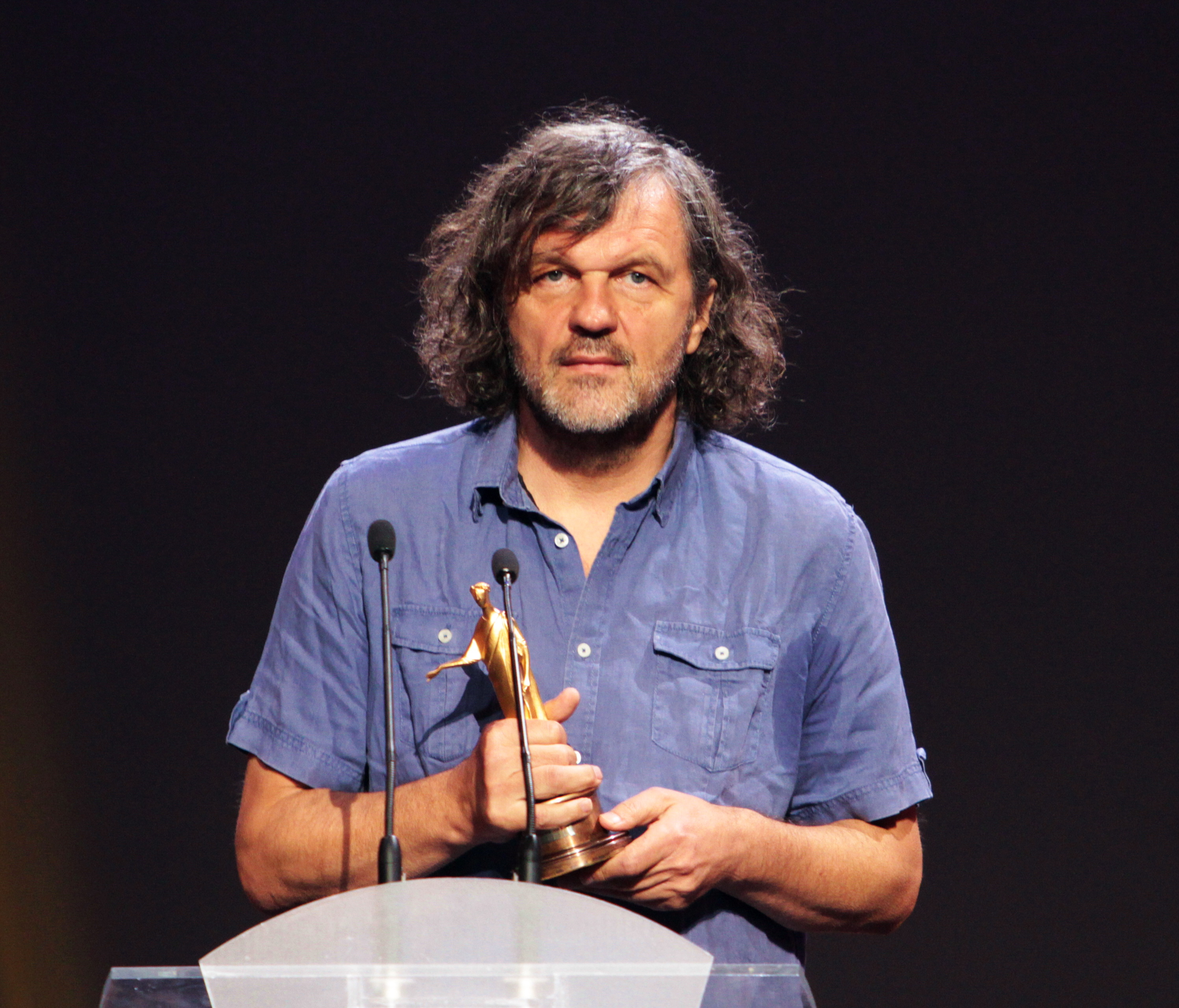 Відкриття 4-ого одеського міжнародного кінофестивалю: Концертна зала Одеського національного академічного театру опери та балету. Емір Кустуріца з «Золотим Дюком»